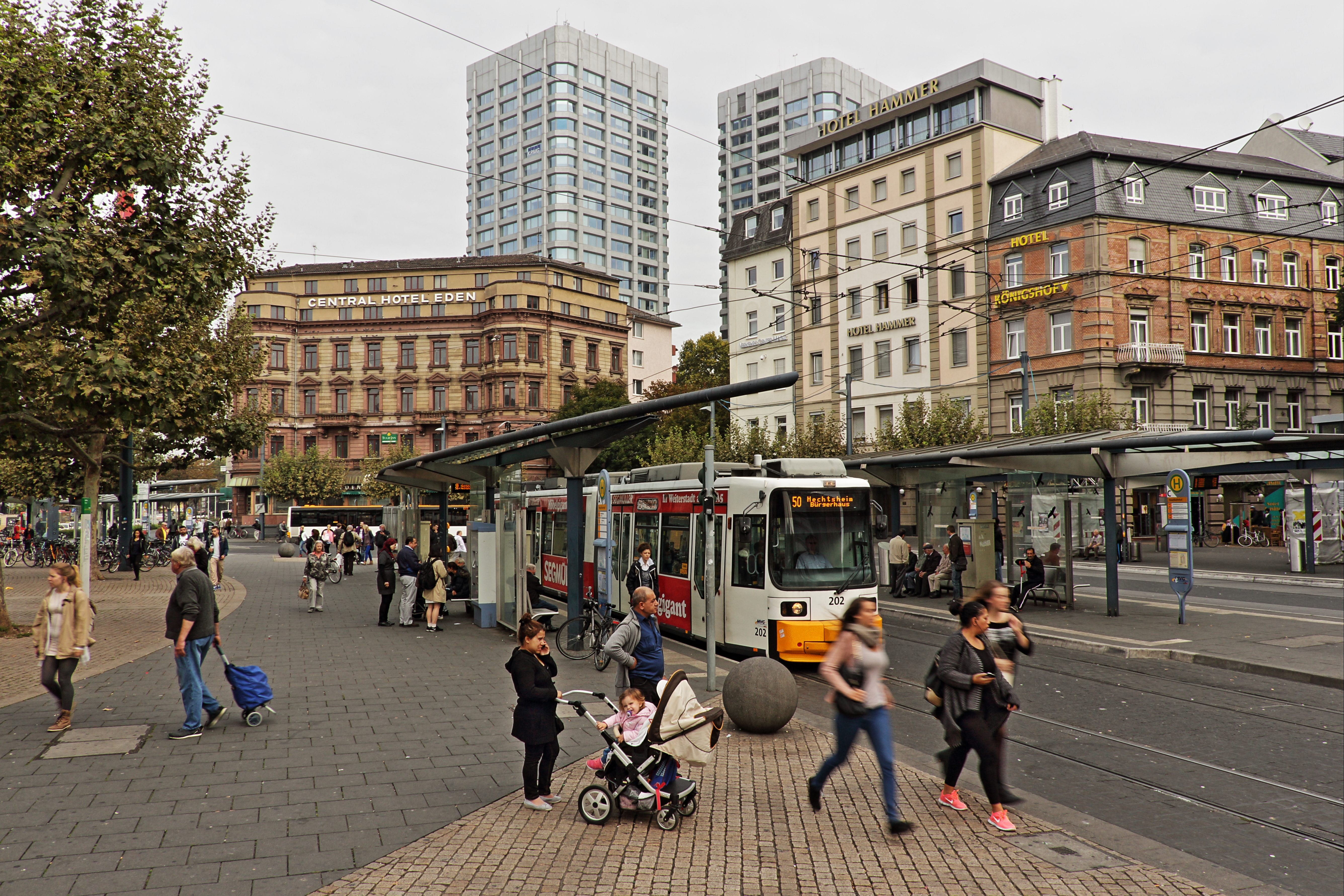 Straßenbahnhaltestellen und halbkreisförmige Platzanlage vor dem Empfangsgebäude des Hauptbahnhofs mit dem Ansatz der fünf strahlenförmig davon abgehenden Straßen und Teilen der Randbebauung, bis 1884 als repräsentativer Stadteingang mit Hotel- und Restaurationsbetrieben angelegt, für den Städtebau des 19. Jh. typische Platzform ( dahinter die Bonifaziustürme